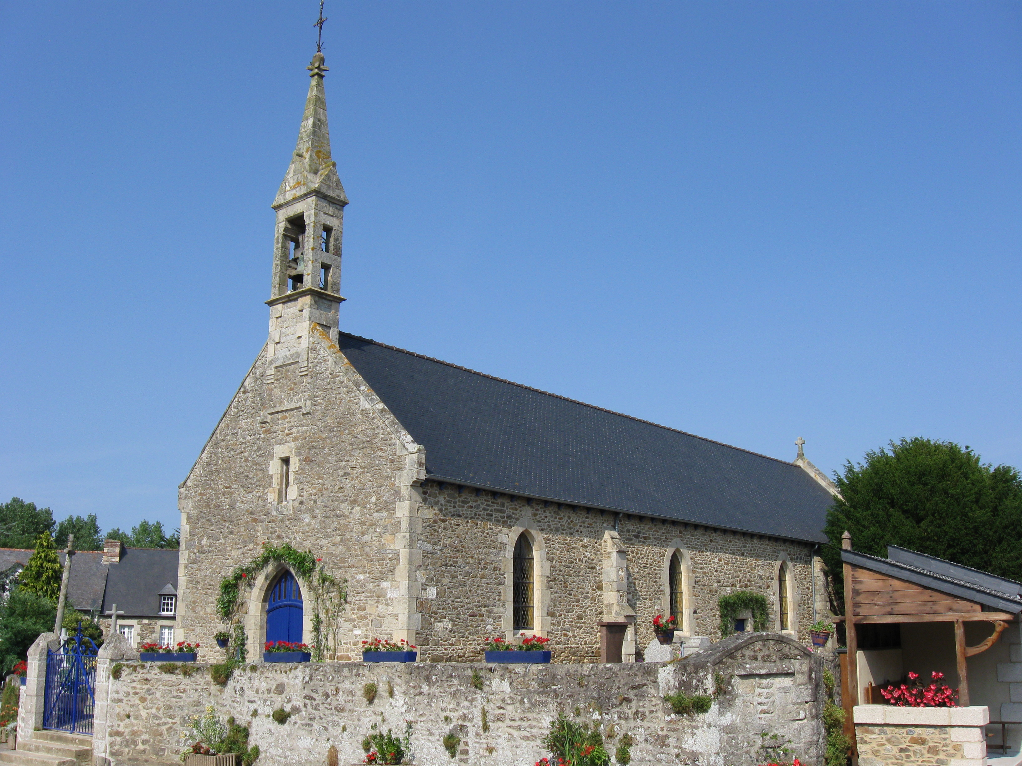 Église Saint-Pierre de Plessix-Balisson. (Côtes-d'Armor, région Bretagne).